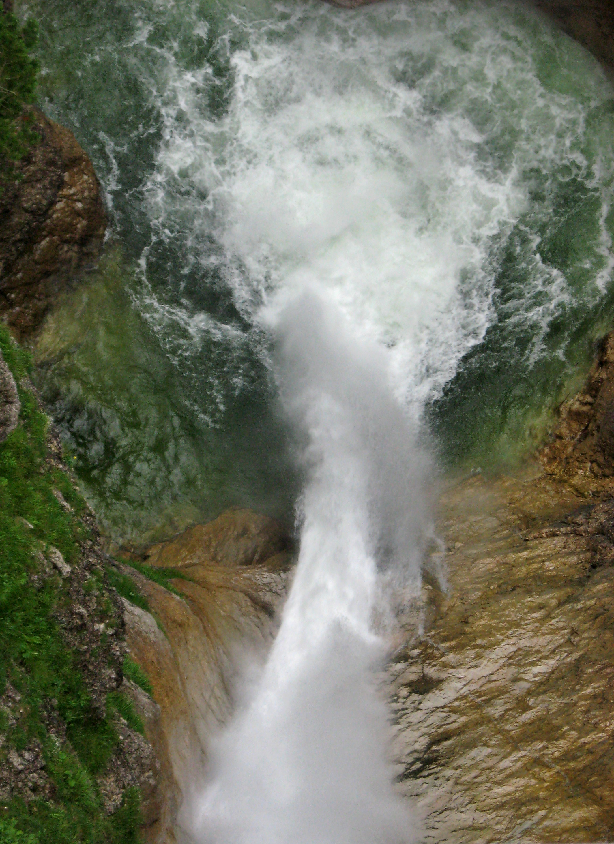 Neuschwanstein, Blick von der Marienbrücke